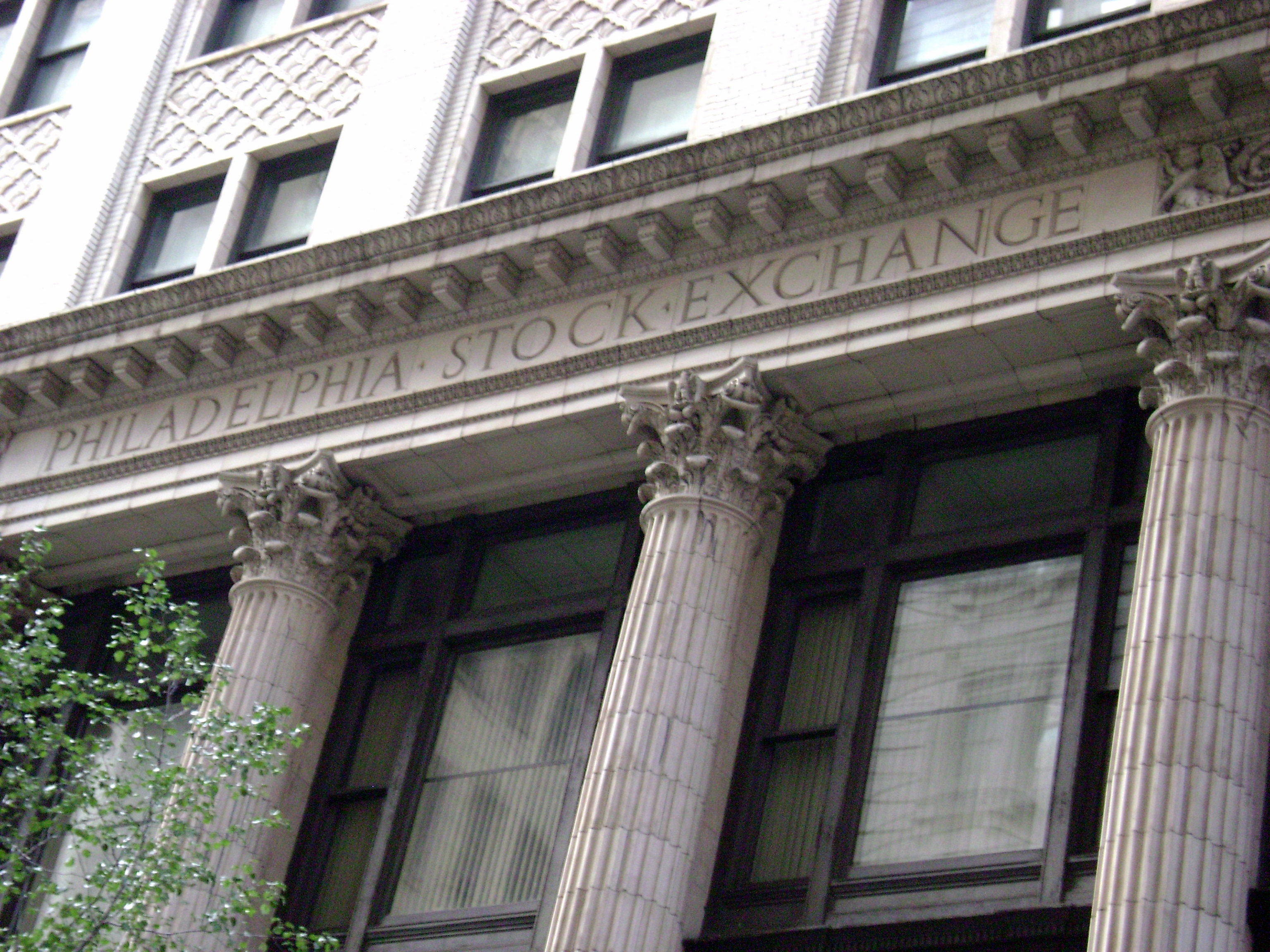 Philadelphia Stock Exchange, 1409-1411 Walnut St.